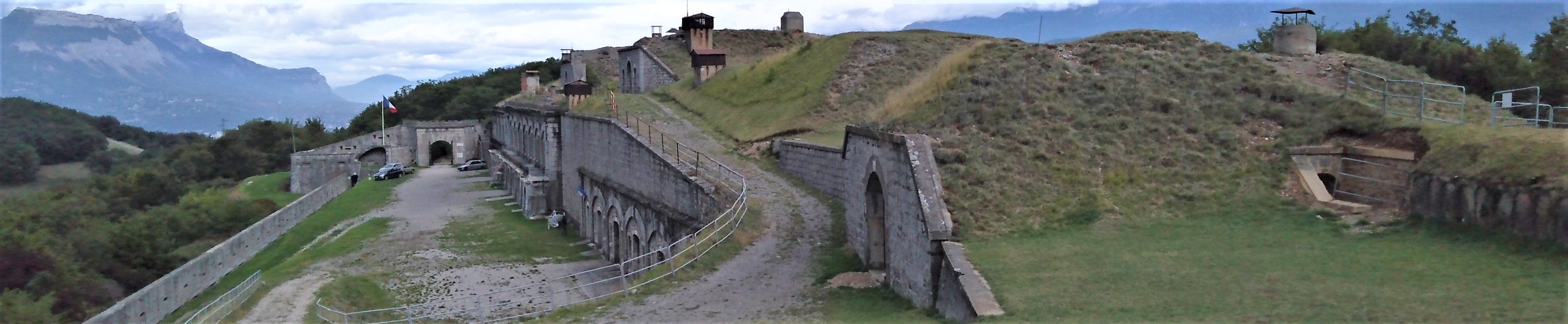 Vue générale du Fort de Comboire en octobre 2019